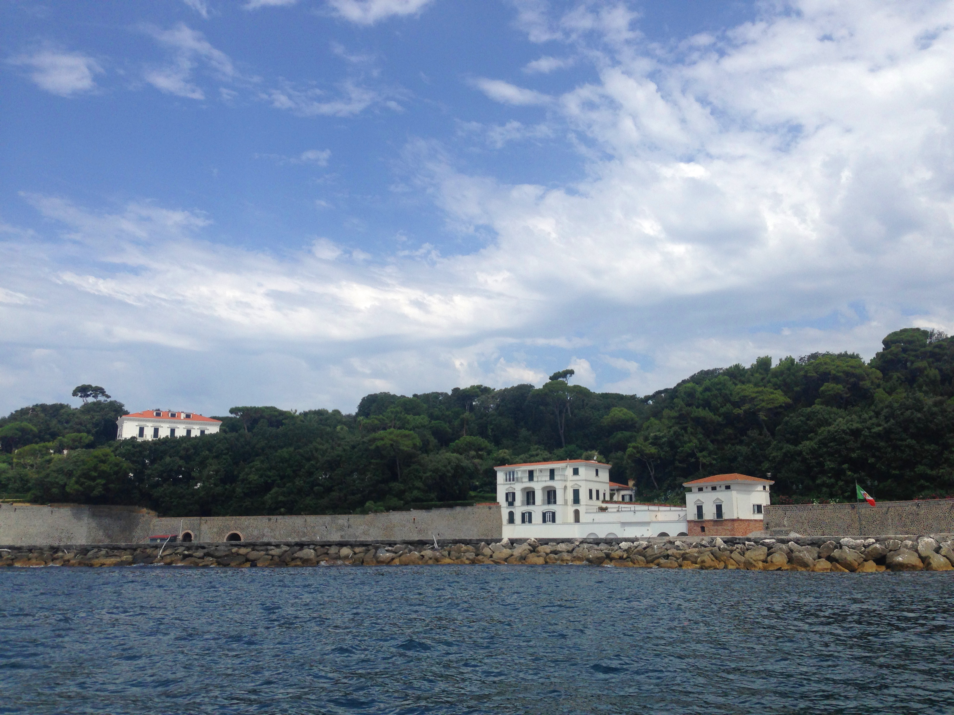 L'ingresso del porto di villa Rosebery. LA villa s'intravede fra gli alberi a sinistra.